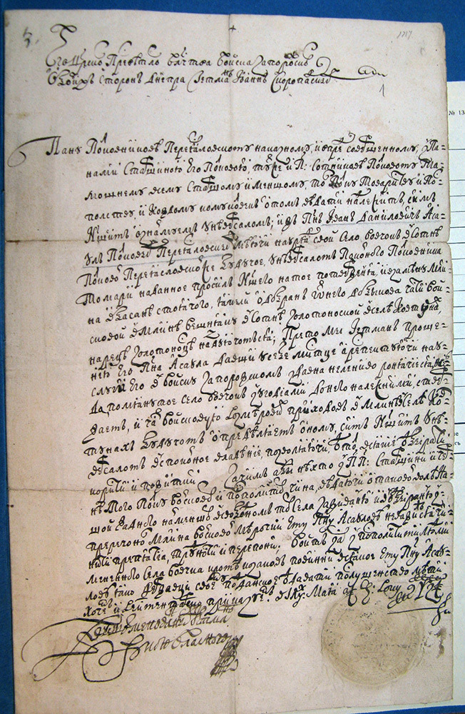 .....между степом Быковской волости и его Безбородки землями граница быть должна от Мокрой Оржицы по могилу …шляхом на Пирятин идучего.....